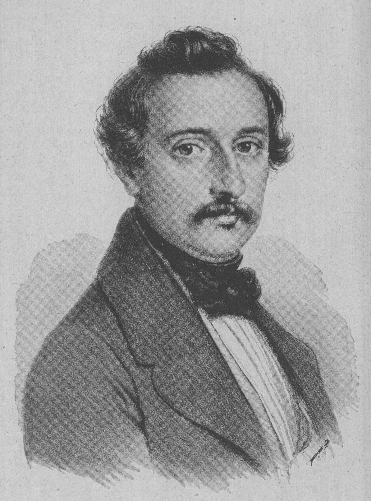 grafika z książki PL